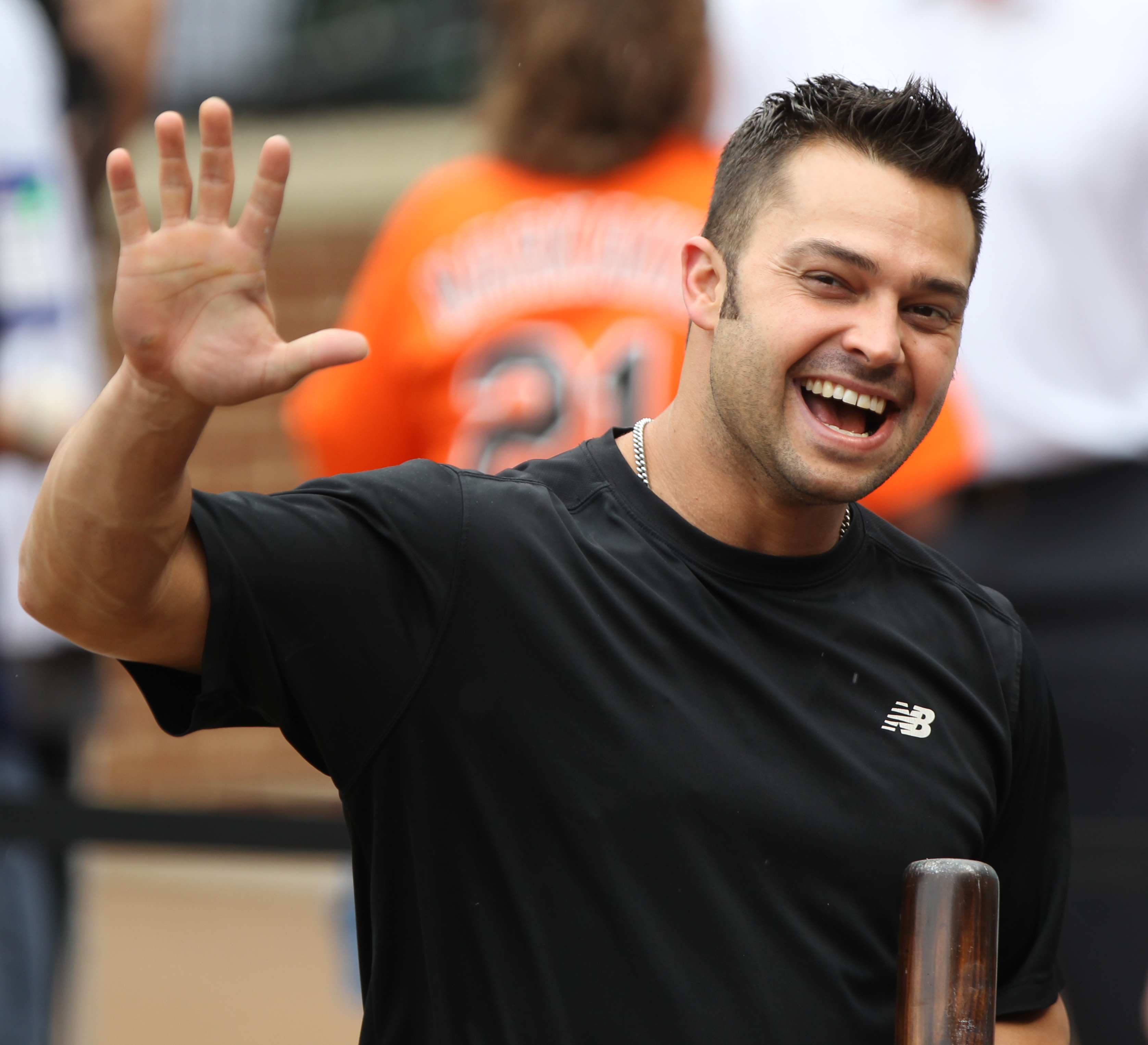 Yankees at Orioles August 28, 2011